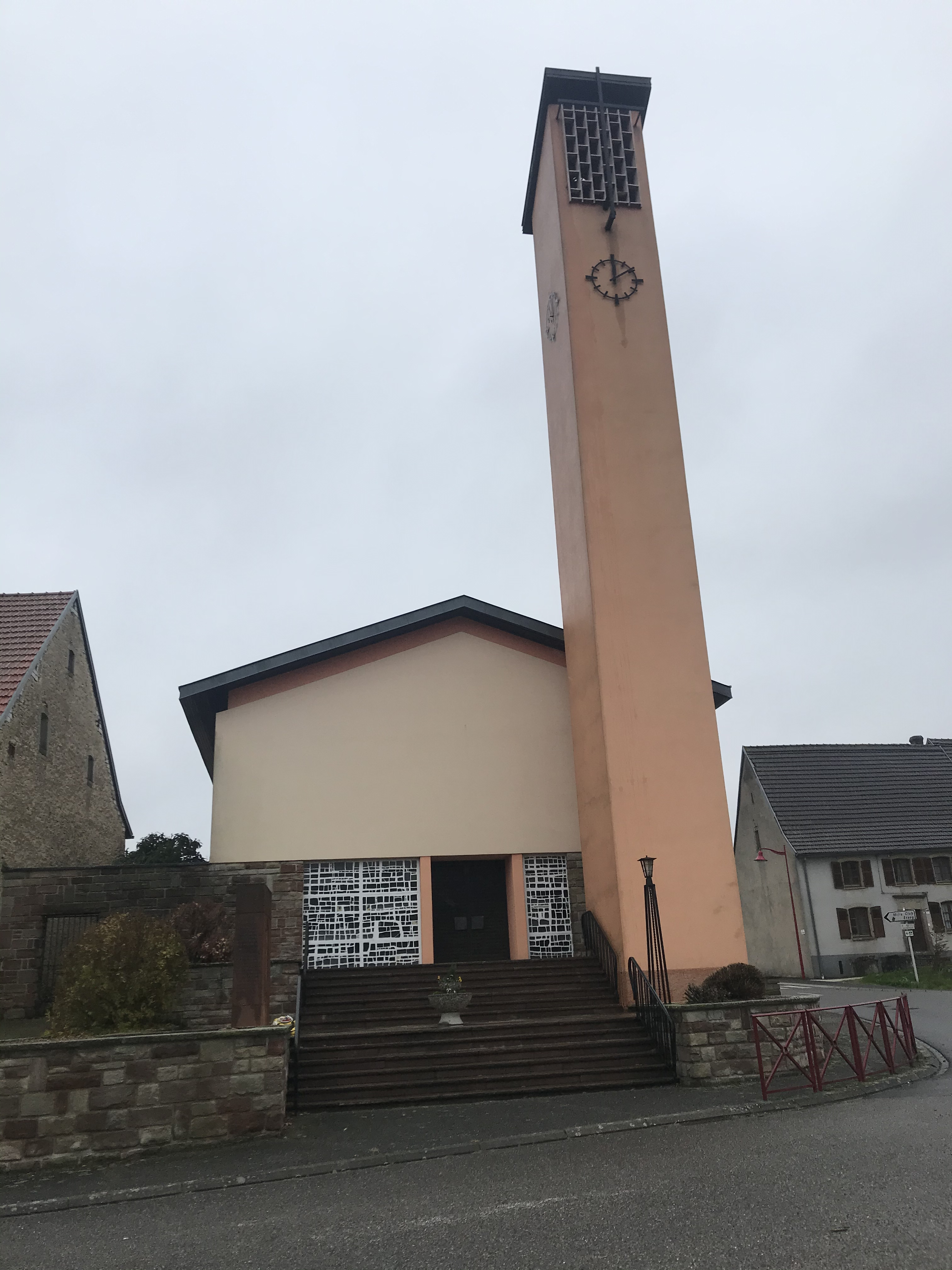 Sur cette photo est représentée l'église de Schopperten. Cette photo a été prise par moi-même le 18 novembre 2019.